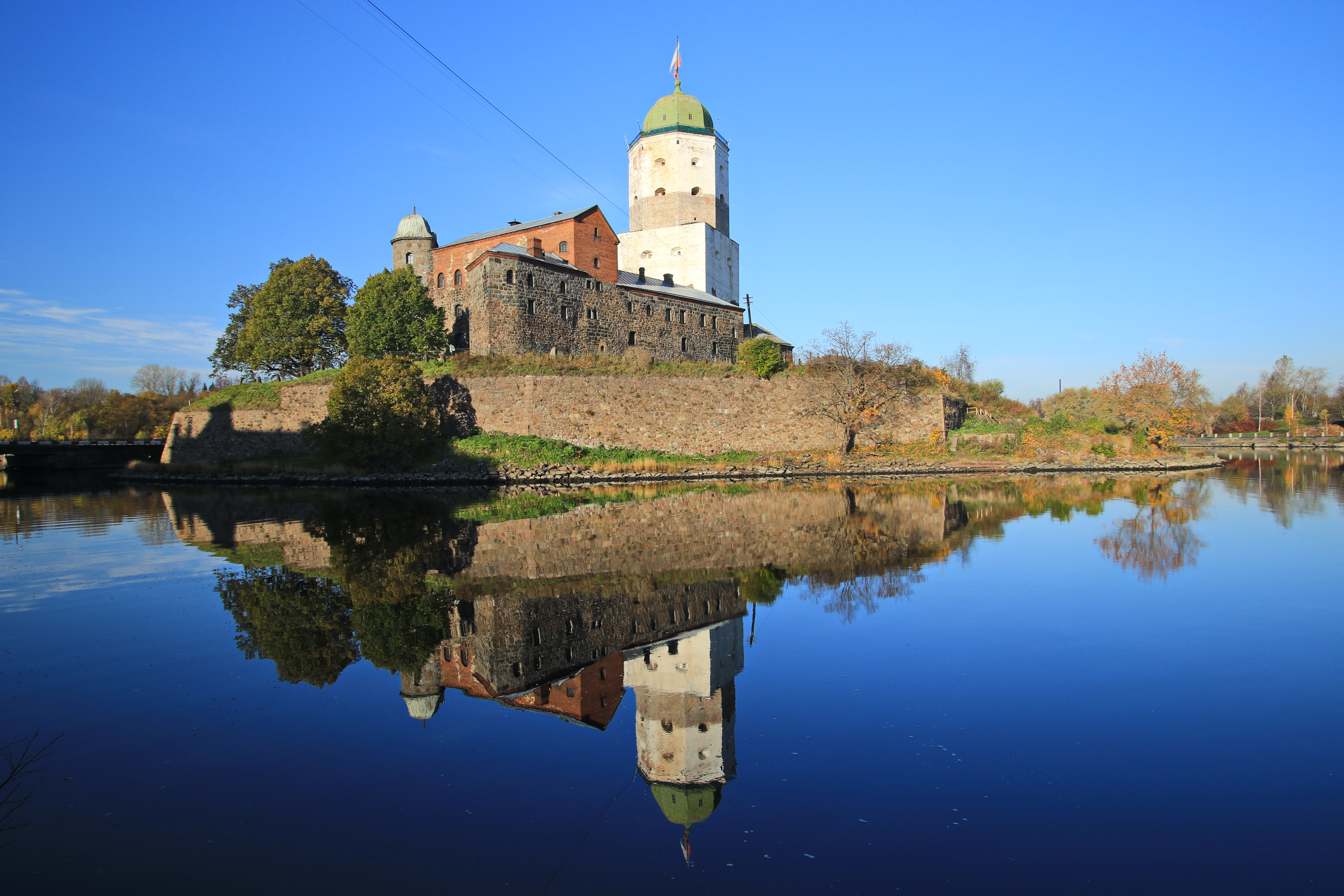 Schloss in Vyborg und Turm von St. Olaf in Russland.